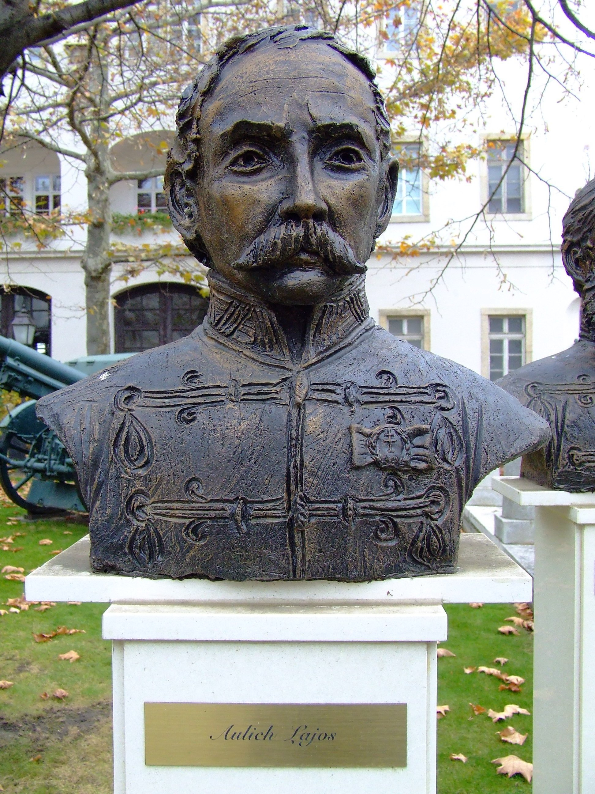 Aulich Lajos (1793–1849) honvéd vezérőrnagy, hadügyminiszter szobra a budapesti Hadtörténeti Intézet és Múzeum udvarán